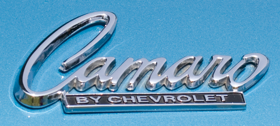 Classic Camaro Logo